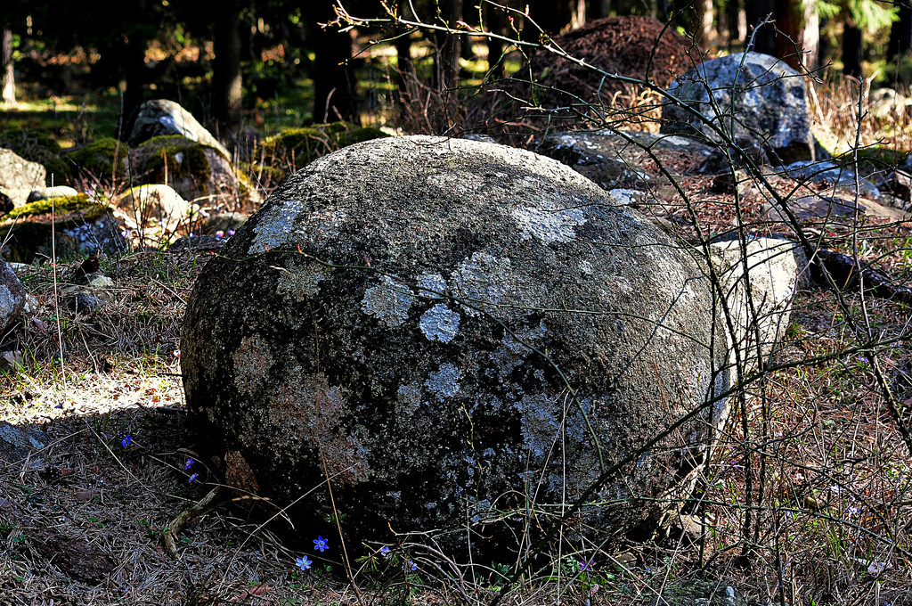 Ett av många gravklot på Lilla Bjärs gravfält, Stenkyrka 26:1, Gotland.